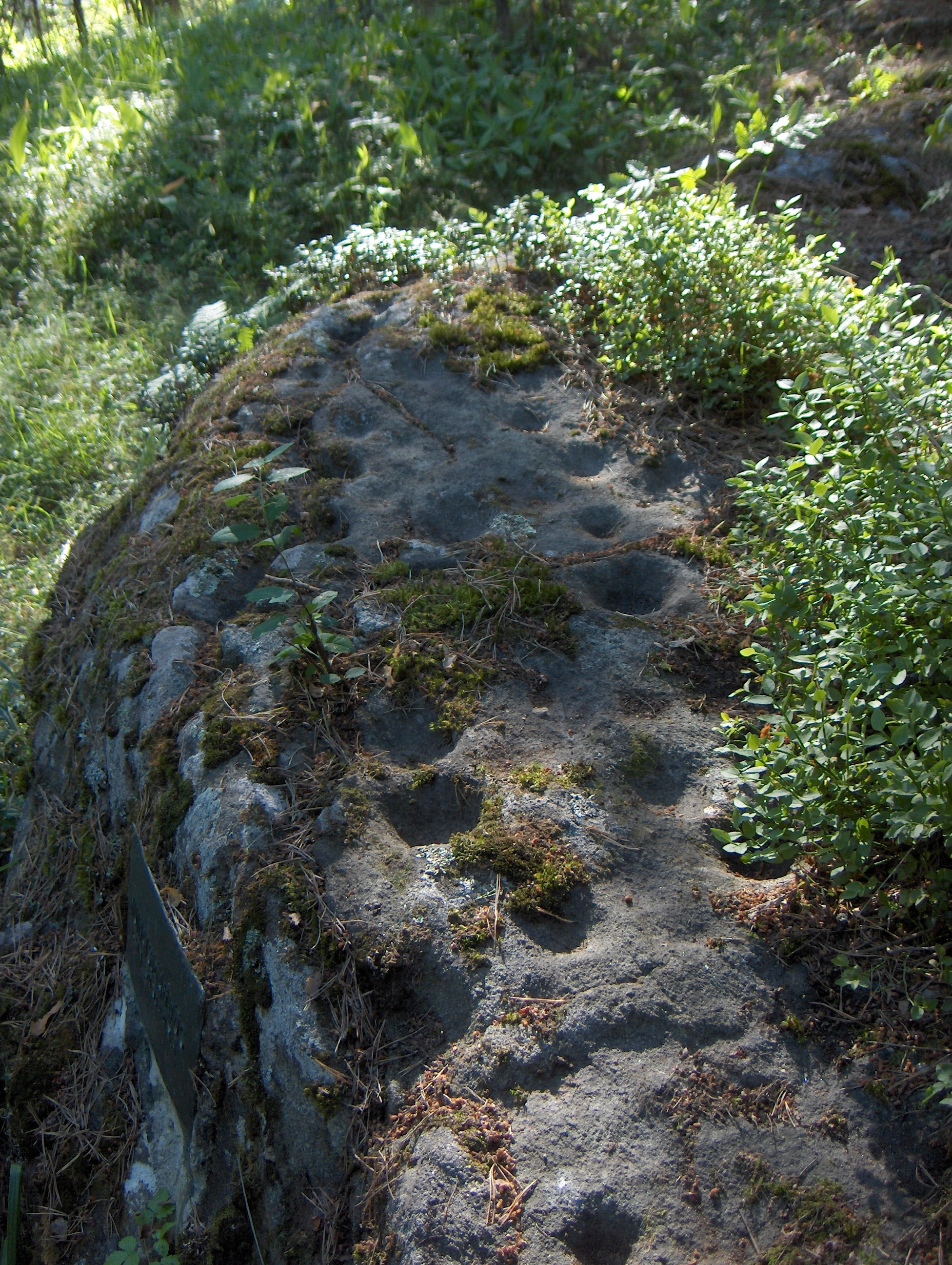 Prehistoric cup-markings on a stone in Hartola, Finland. Esihistoriallinen kuppikivi Hartolassa, Päijät-Hämeessä. Kiven kylkeen on joskus vuosia sitten kiinnitetty metallilaatta (kuvassa vasemmalla alhaalla), jonka mukaan kivi on rauhoitettu muinaisjäännös.